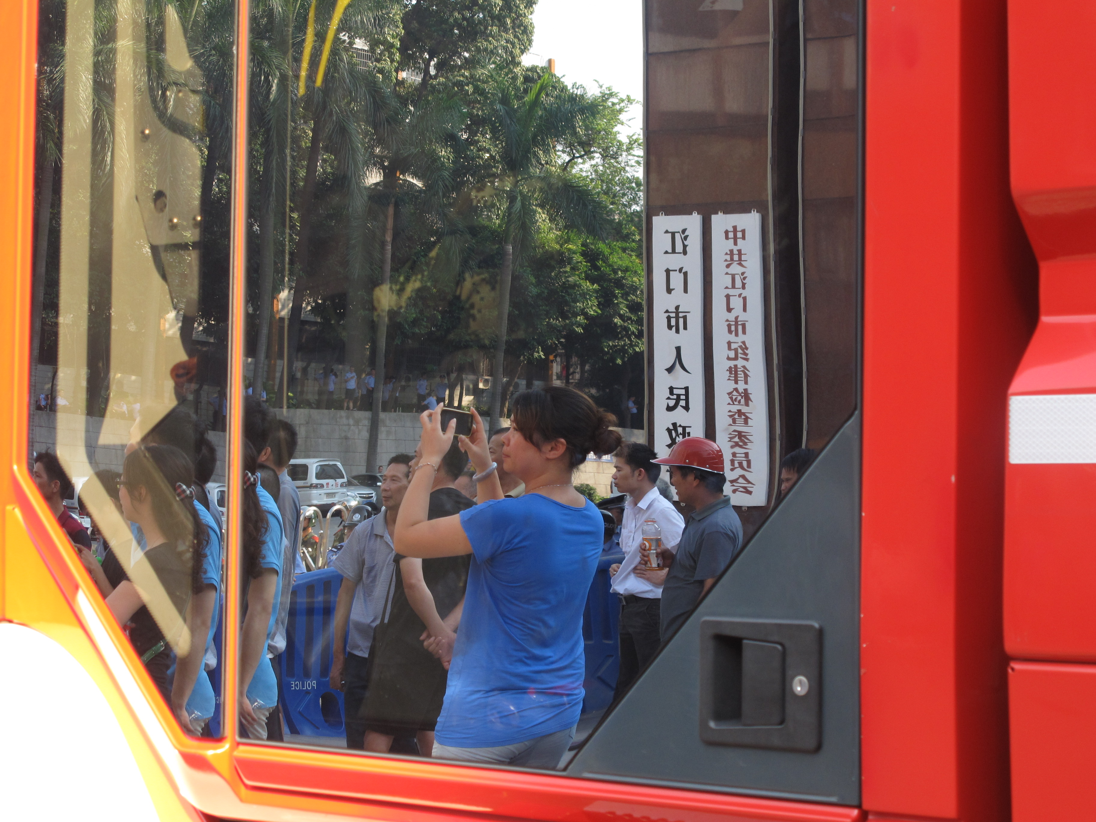 中文（中国大陆）: 反核抗议游行期间,消防车在场戒备,同时也并未阻止一般民众前来参与、拍照、聚集、叫口号